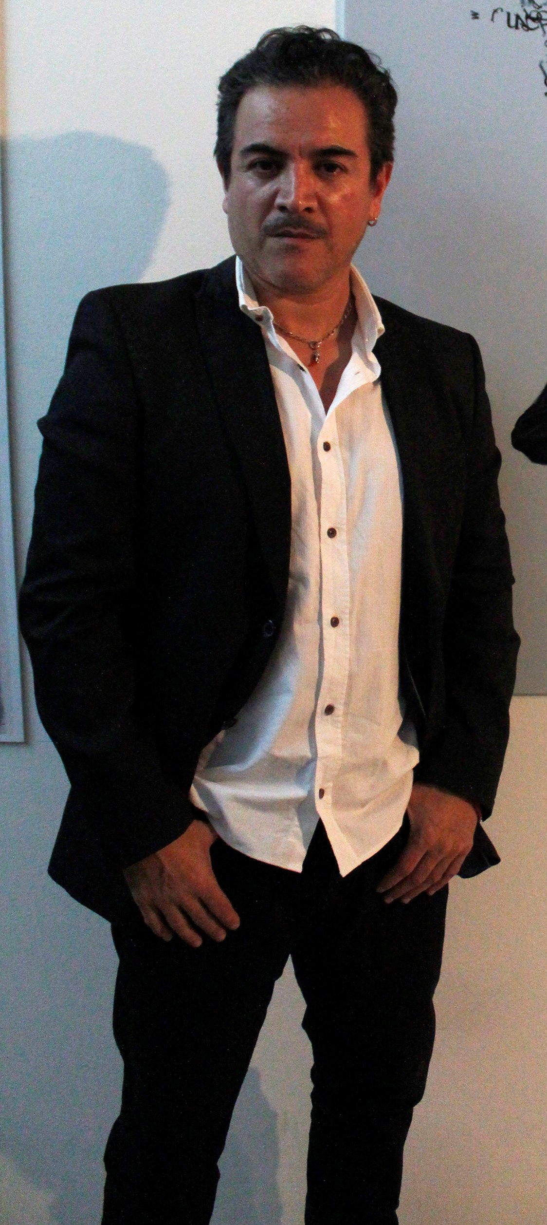 Martes 3 de marzo de 2020. En la Escuela de Música del Rock a la Palabra se inauguró la exposición Rockaricatura, del artista plástico Jorge Flores Manjarrez. La presentación cuenta con 25 imágenes de personajes del mundo del rock en caricatura, tales como Eric Clapton, Elvis Presley, David Bowie y otros más.